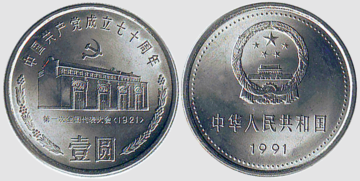 скрін із сайту